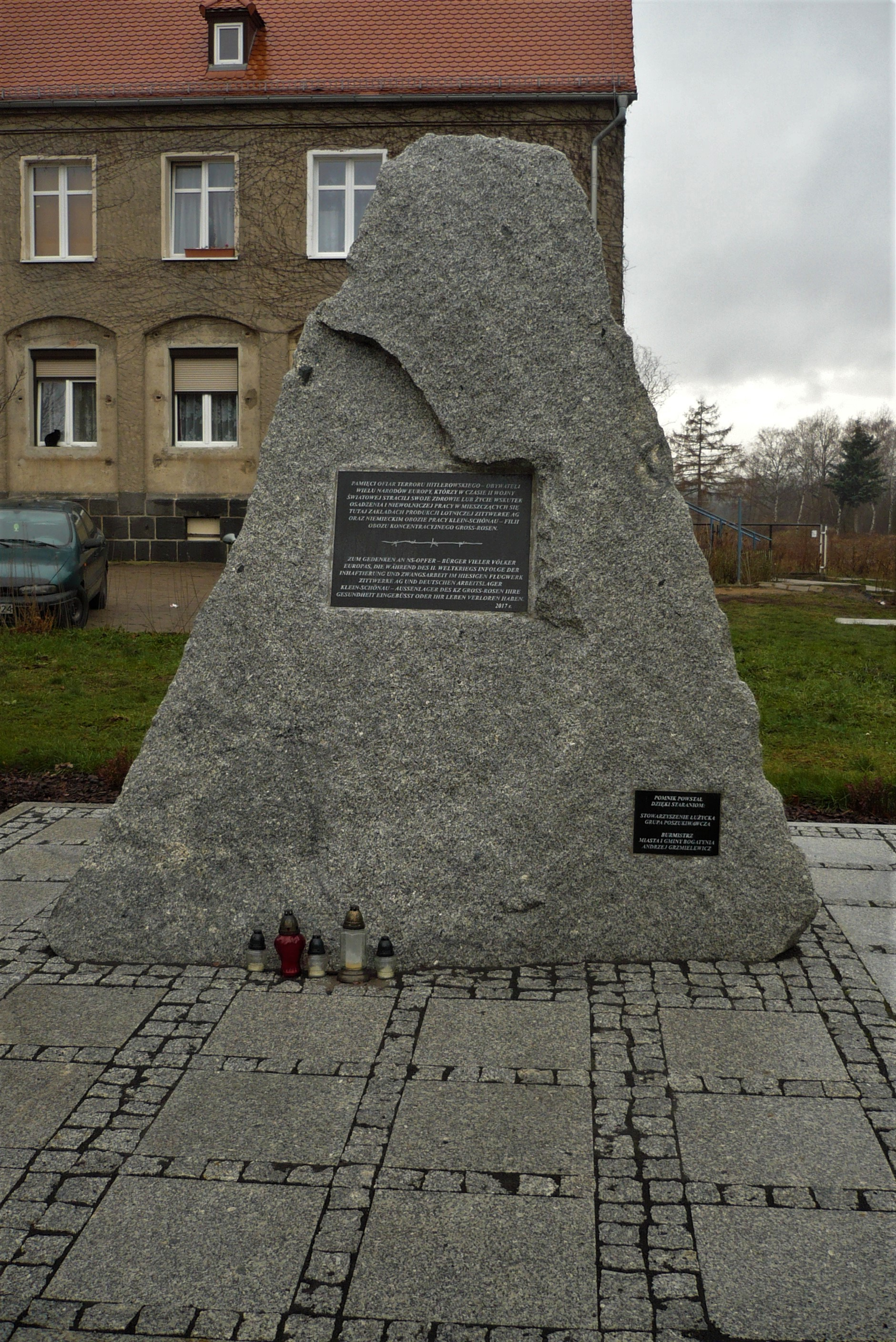 Sieniawka tablica